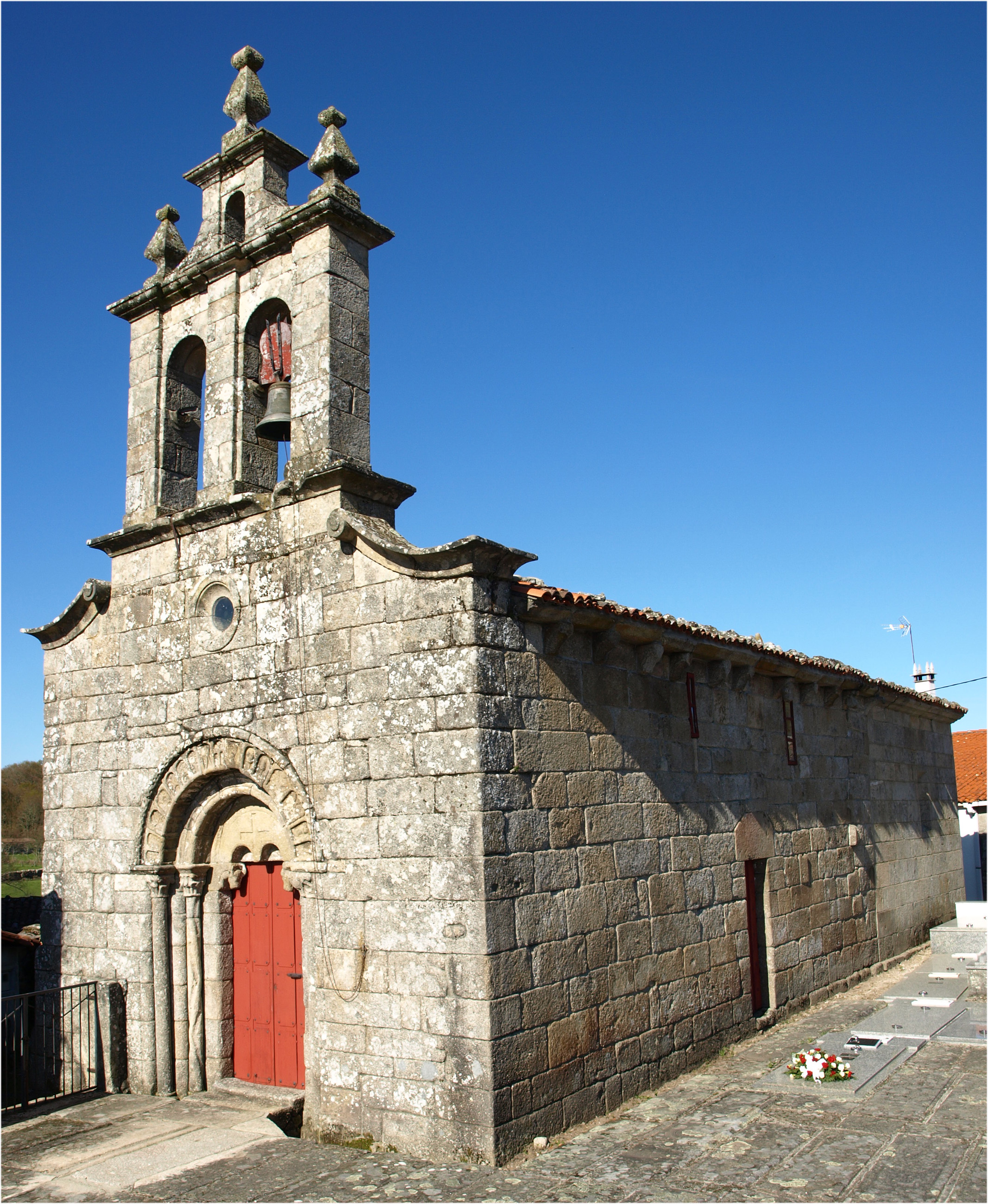 Igrexa parroquial de Esporiz (Monterroso)